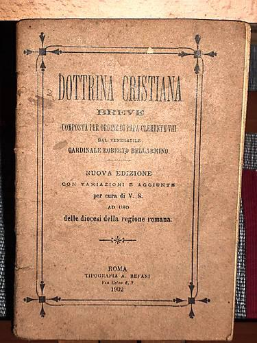 San Roberto Bellarmino, Dottrina Cristiana Breve, A. Befani, 1902